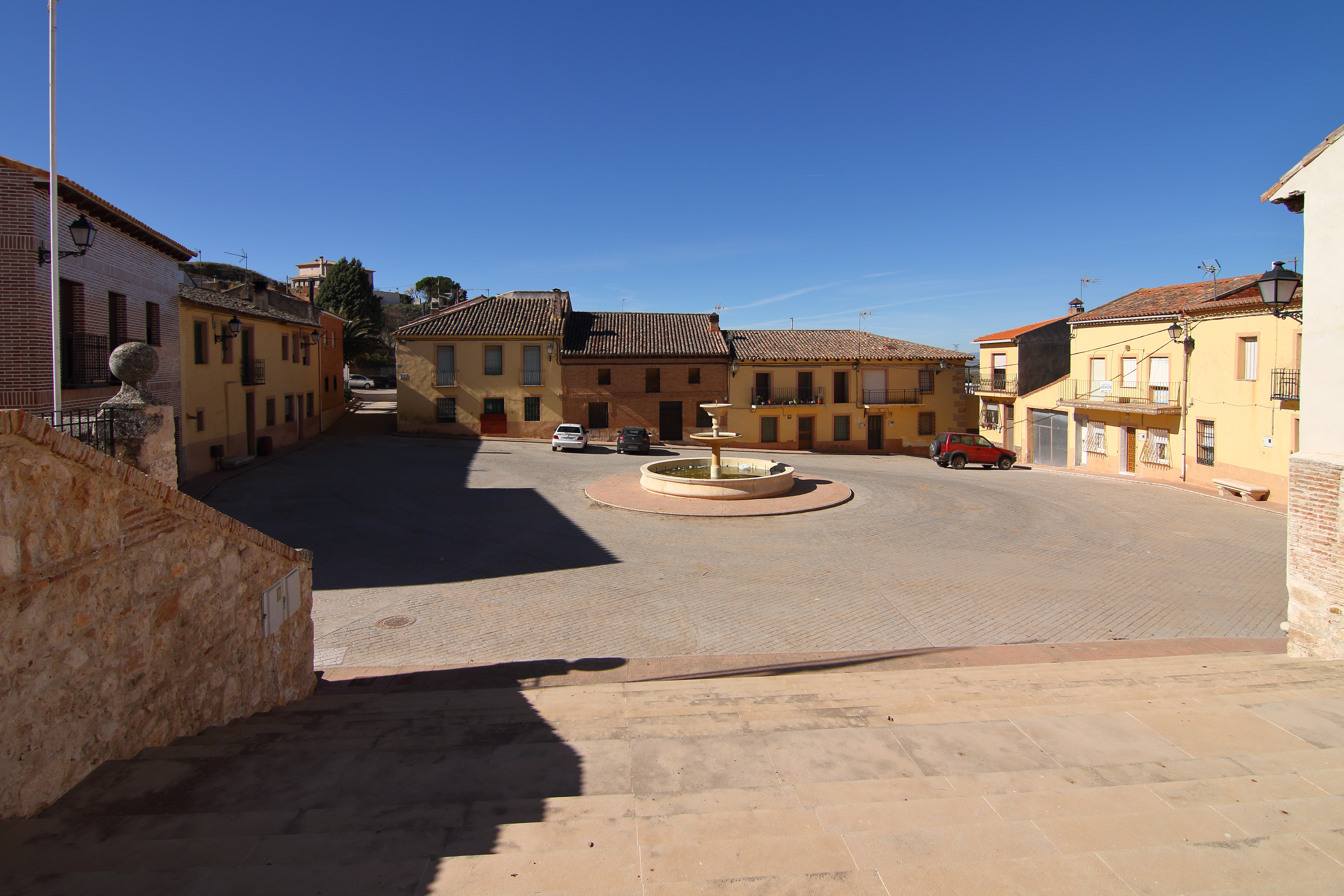 Ciruelas, Plaza Mayor